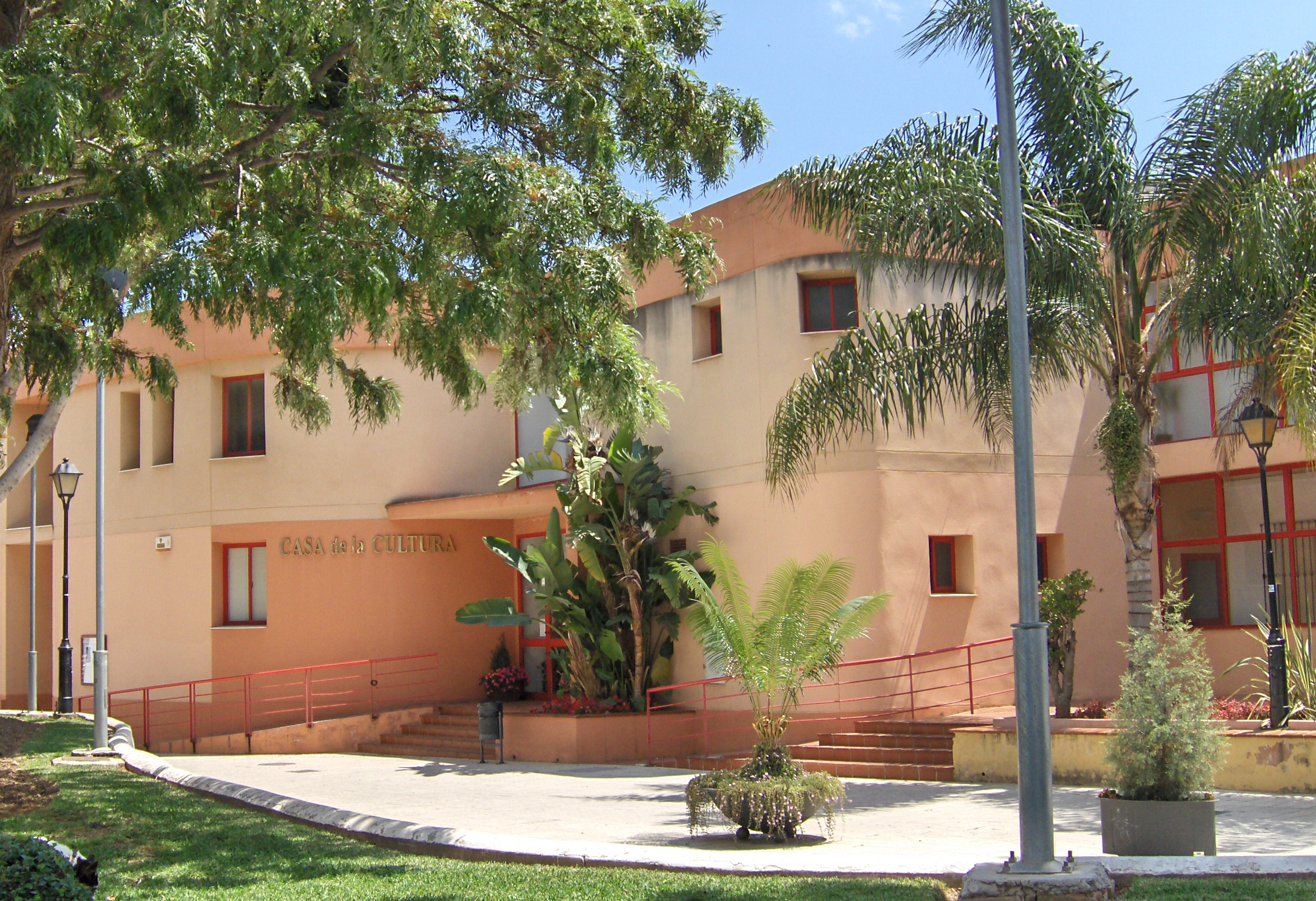 Casa de la Cultura de Las Lagunas (Mijas-Costa)